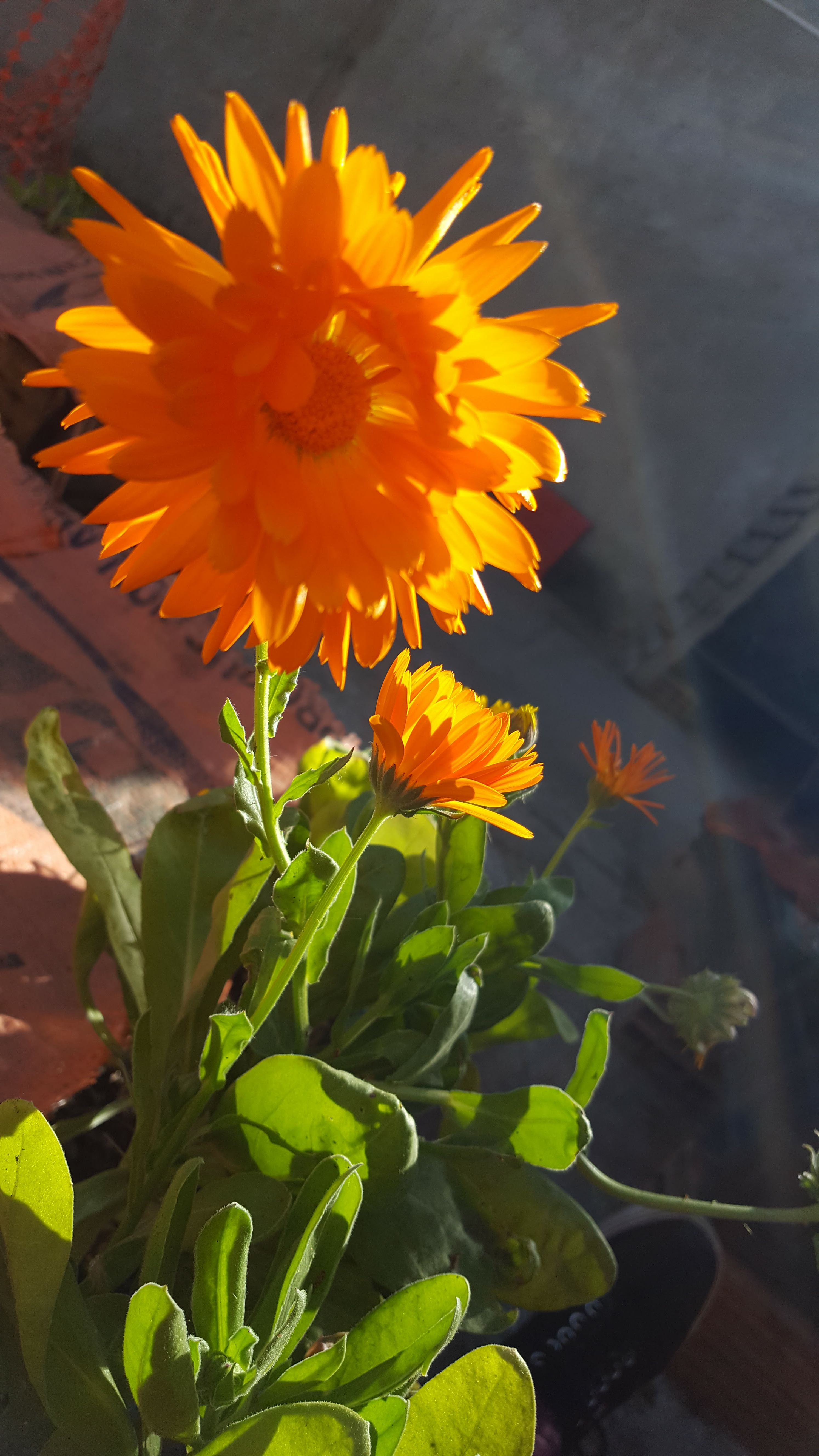 De modo educativo fue plantada desde una semilla en un almácigo esta Caléndula para observar su crecimiento ya que no hay mejor forma de aprender que viviendo las cosas. A su vez, ayuda a prevenir plagas y a atraer abejas y otros polinizadores que mejoren la calidad de las otras plantas.